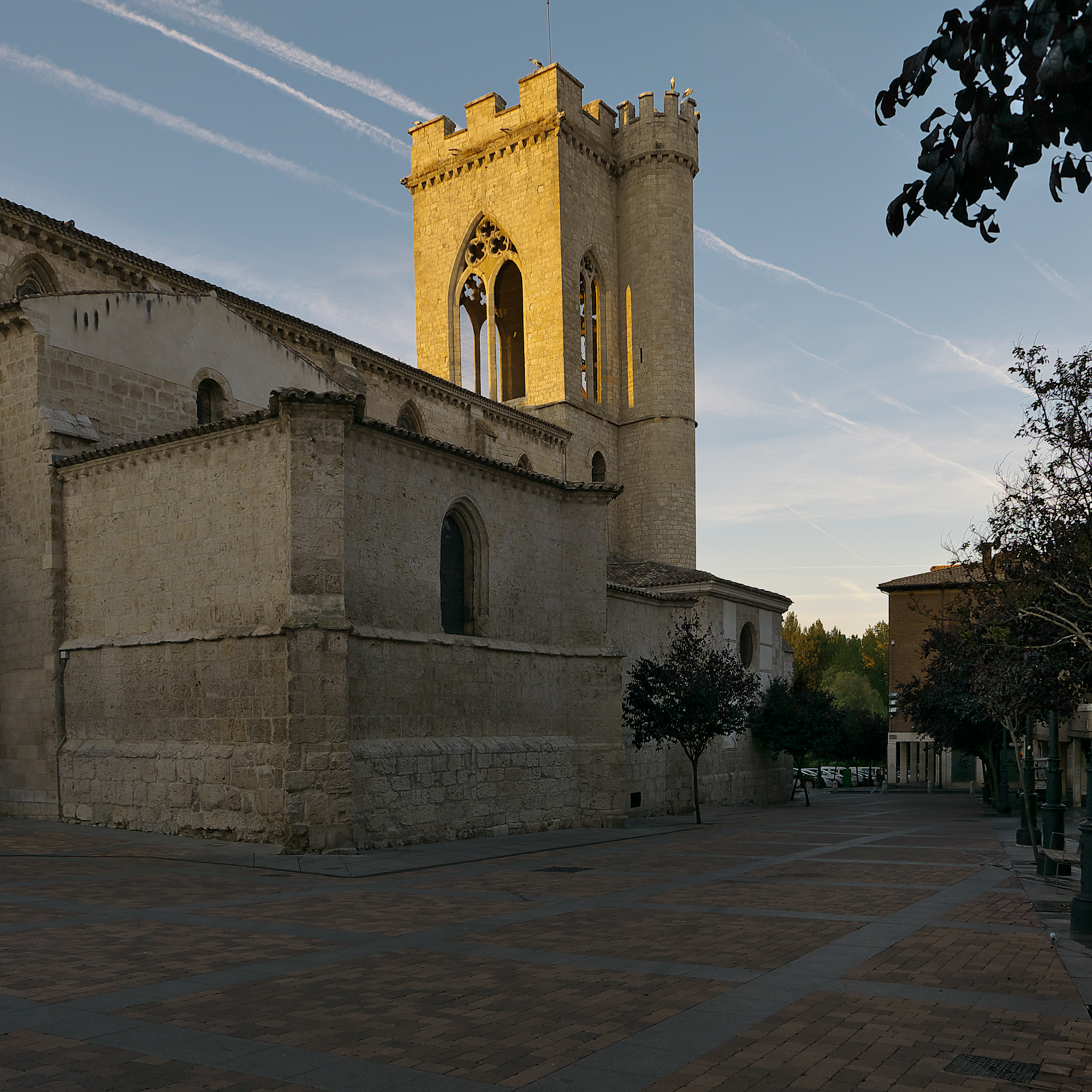 Imagen característica de la ciudad de Palencia.